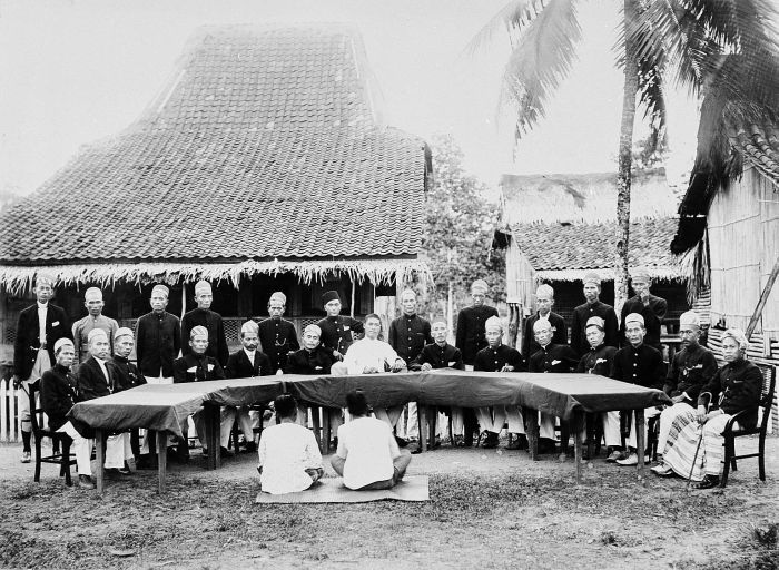 foto. Nederlands-Indië is wel een 'plurale' samenleving genoemd (tegenwoordig zouden we het misschien een multiculturele samenleving noemen). Dat kwam vooral duidelijk naar voren bij de rechtspraak. In de hele Archipel hadden groepen mensen met diverse rechtspluralisme te maken, dat wil zeggen dat er meer dan één rechtsstelsel voor hen gold. Zo was er in veel streken sprake van ongeschreven gewoonterecht (adat of adatrecht) naast islamitische rechtsregels. Verder was er soms op schrift gesteld vorstenrecht, zoals op Java. Tenslotte hadden de Nederlanders hun eigen recht meegebracht. Bij zoveel tegelijkertijd geldende rechtssystemen waren gemengde rechtbanken, zoals op de foto, dan ook normaal. (P. Boomgaard, 2001). Rechtszitting in Palembang